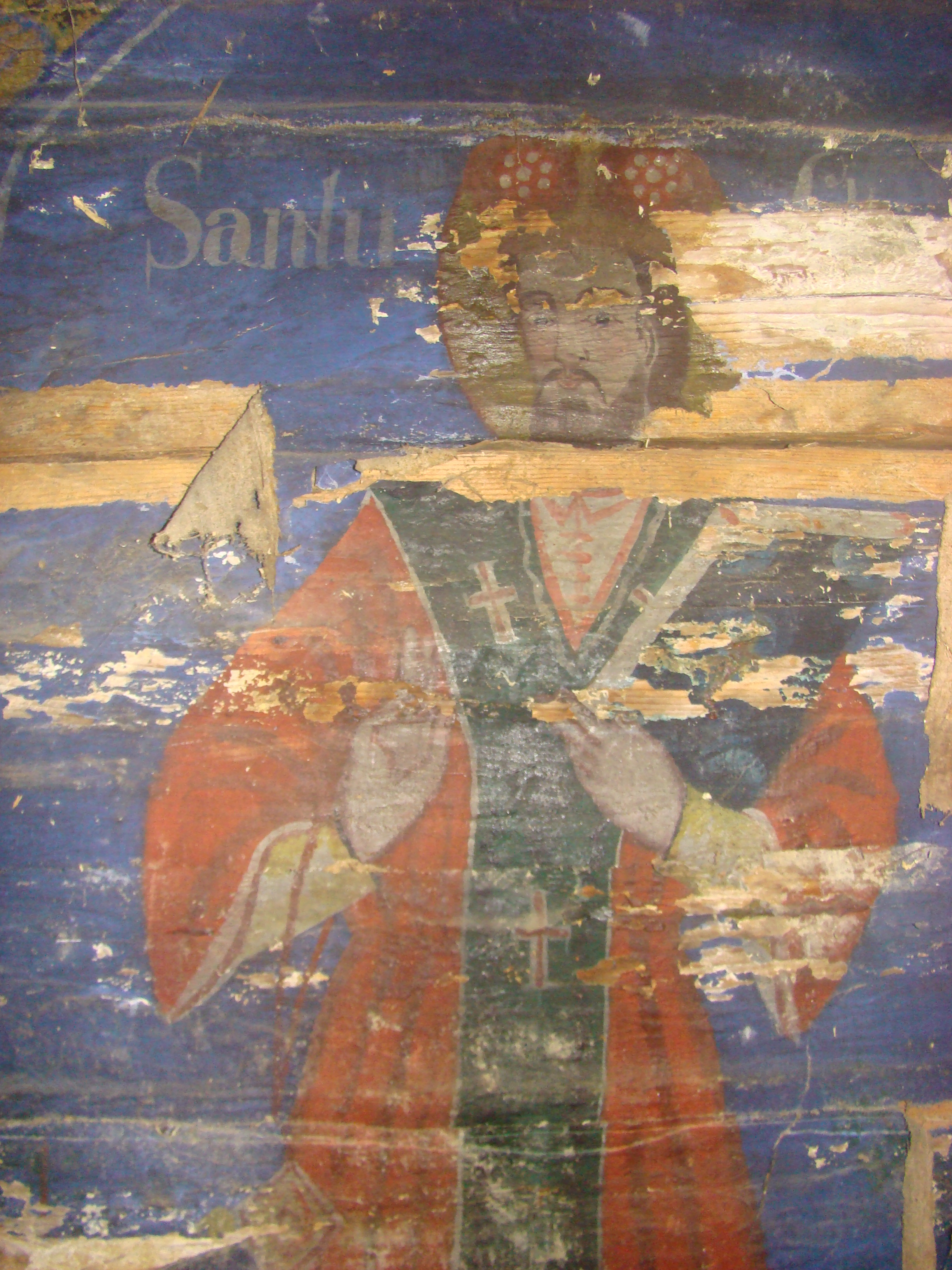 Biserica de lemn "Sfântul Petru" din Mureșenii de Câmpie